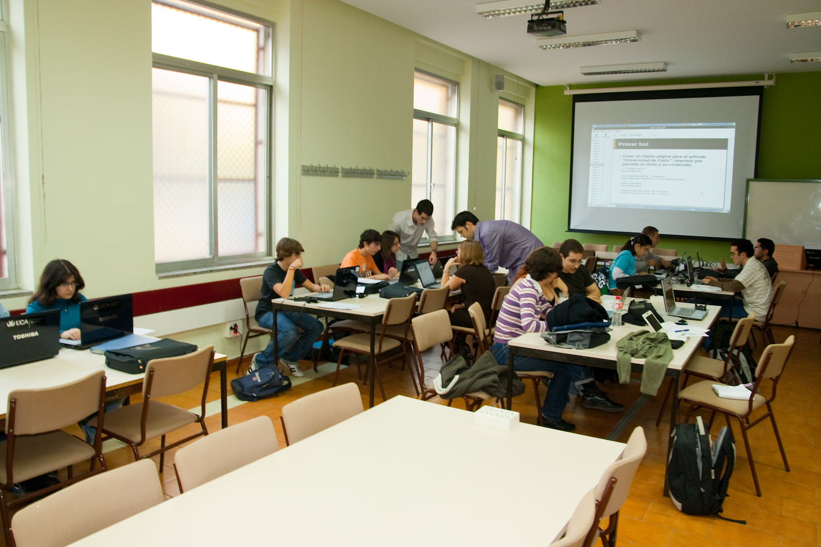 Taller de bots, Cádiz.